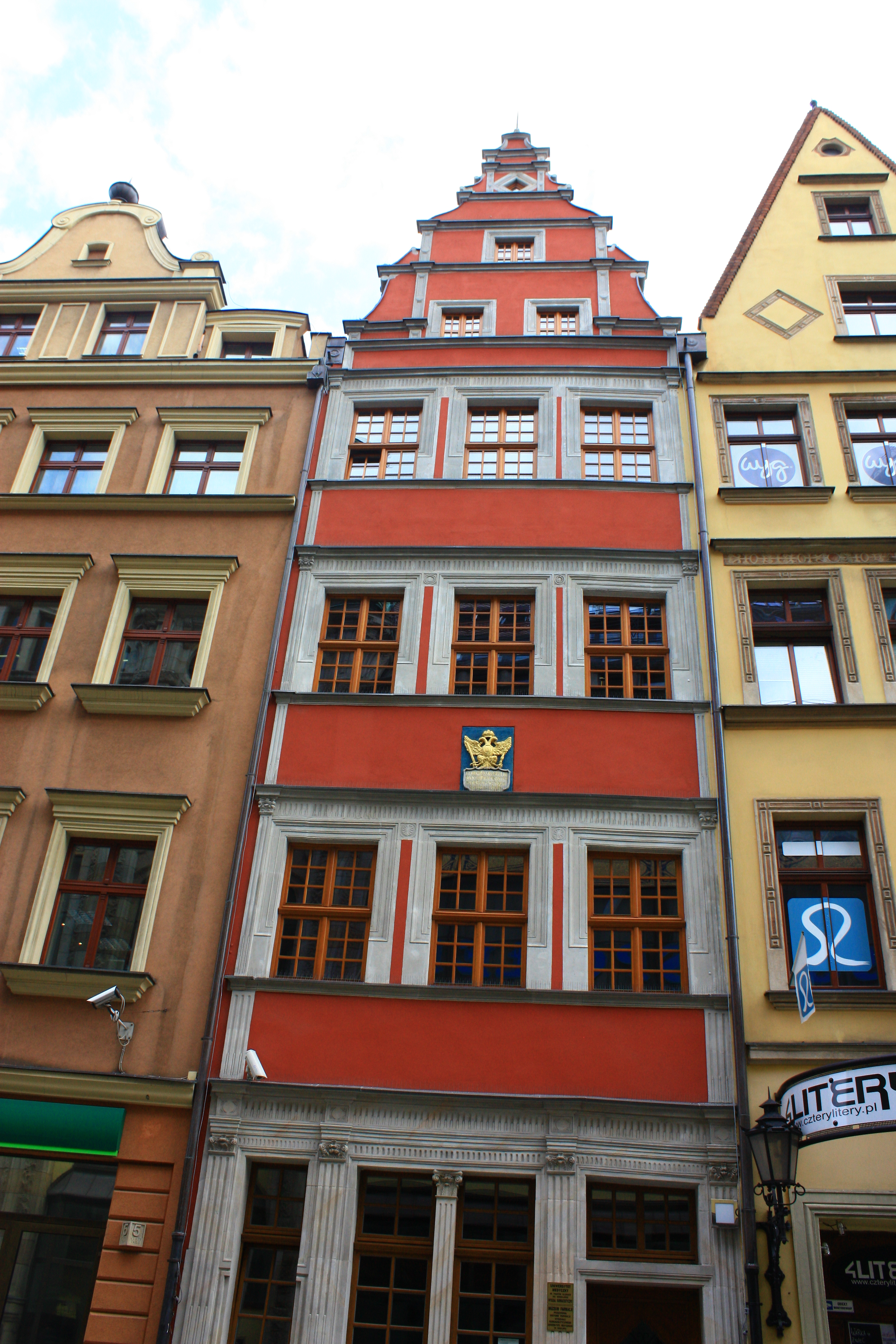 Wrocław, kamienica, XVI